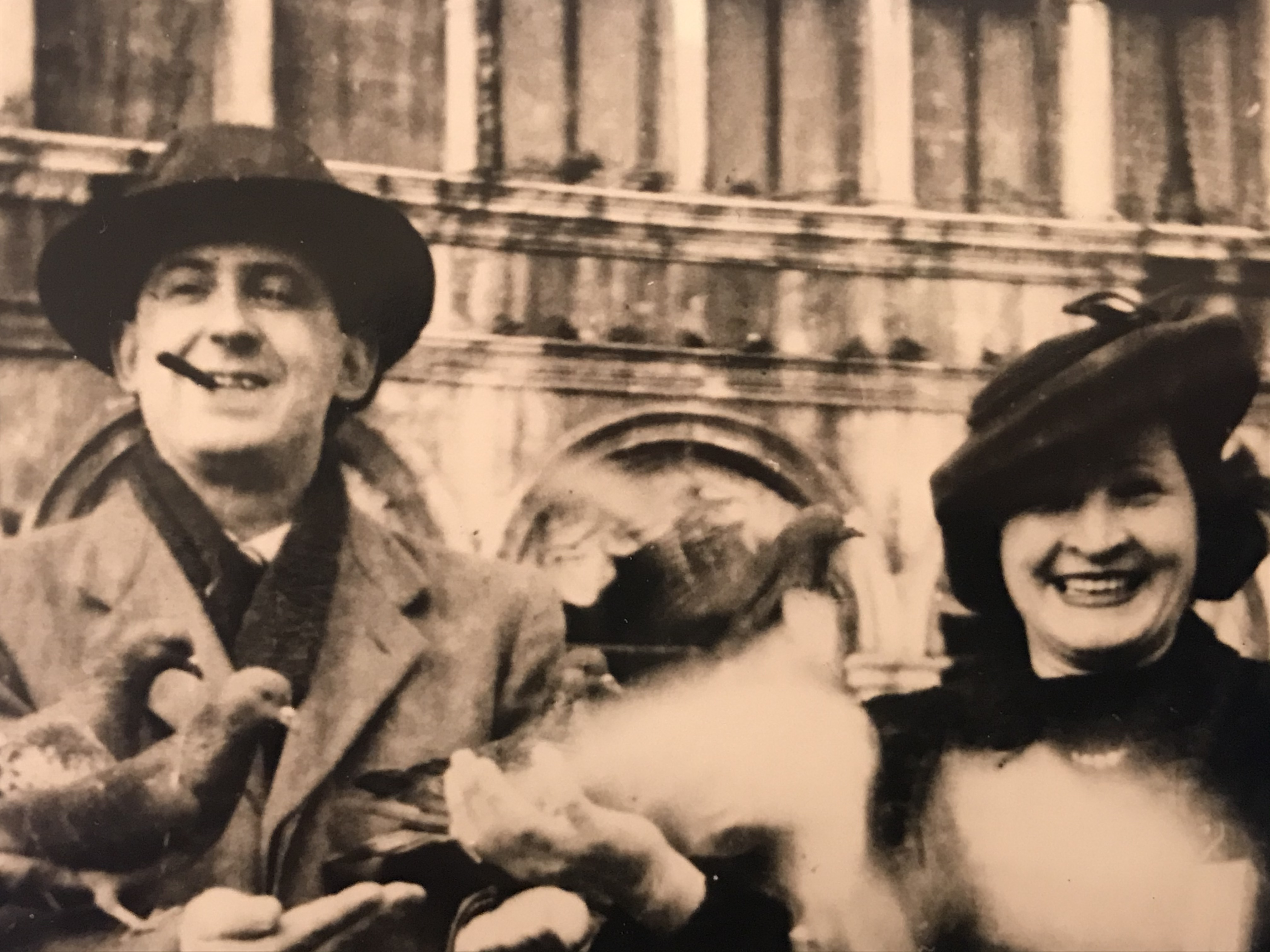 Foto di Valentino Bruchi